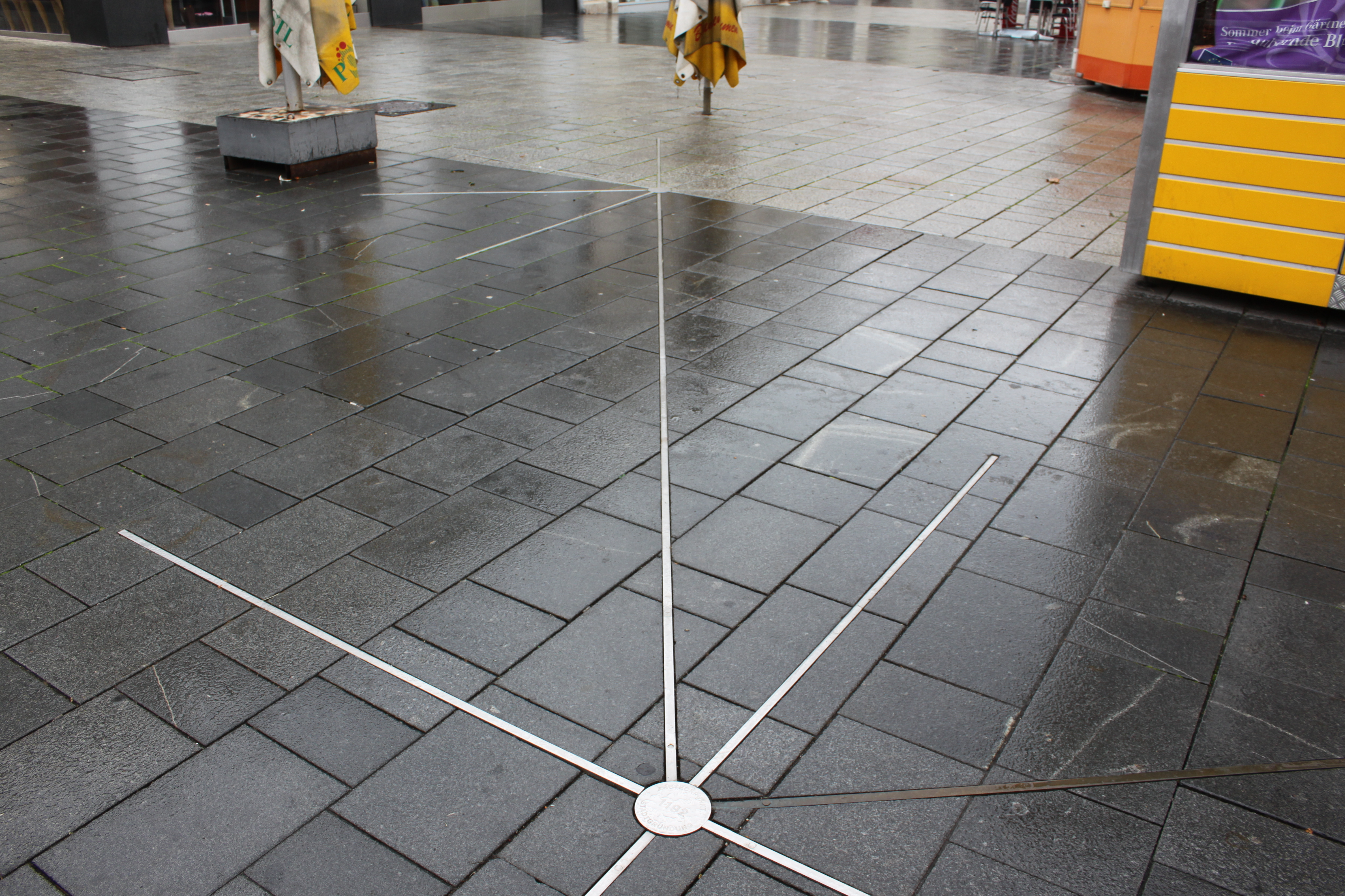 Hauptplatz Wiener Neustadt A-Punkt der Stadt vorne und H-Punkt vom Hauptplatz hinten, in der Flucht zum Portalpunkt des Domes